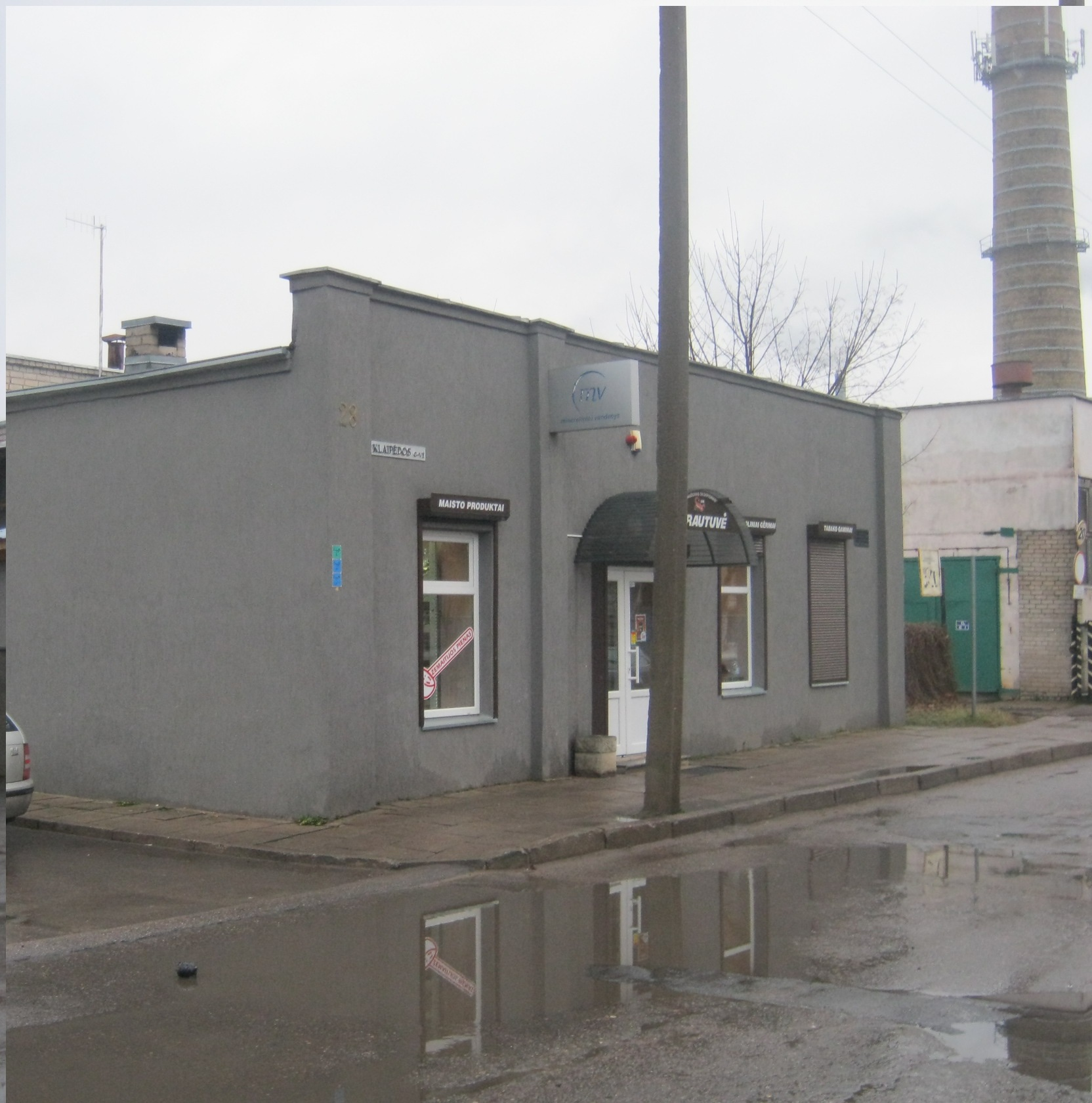 Buvusios Jonavos sinagogos dalis Klaipėdos g. 28